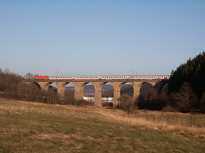 InterRegio 2410 Frankfurt (Main) Hbf–Norddeich Mole auf dem Rudersdorfer Viadukt (Dillstrecke)